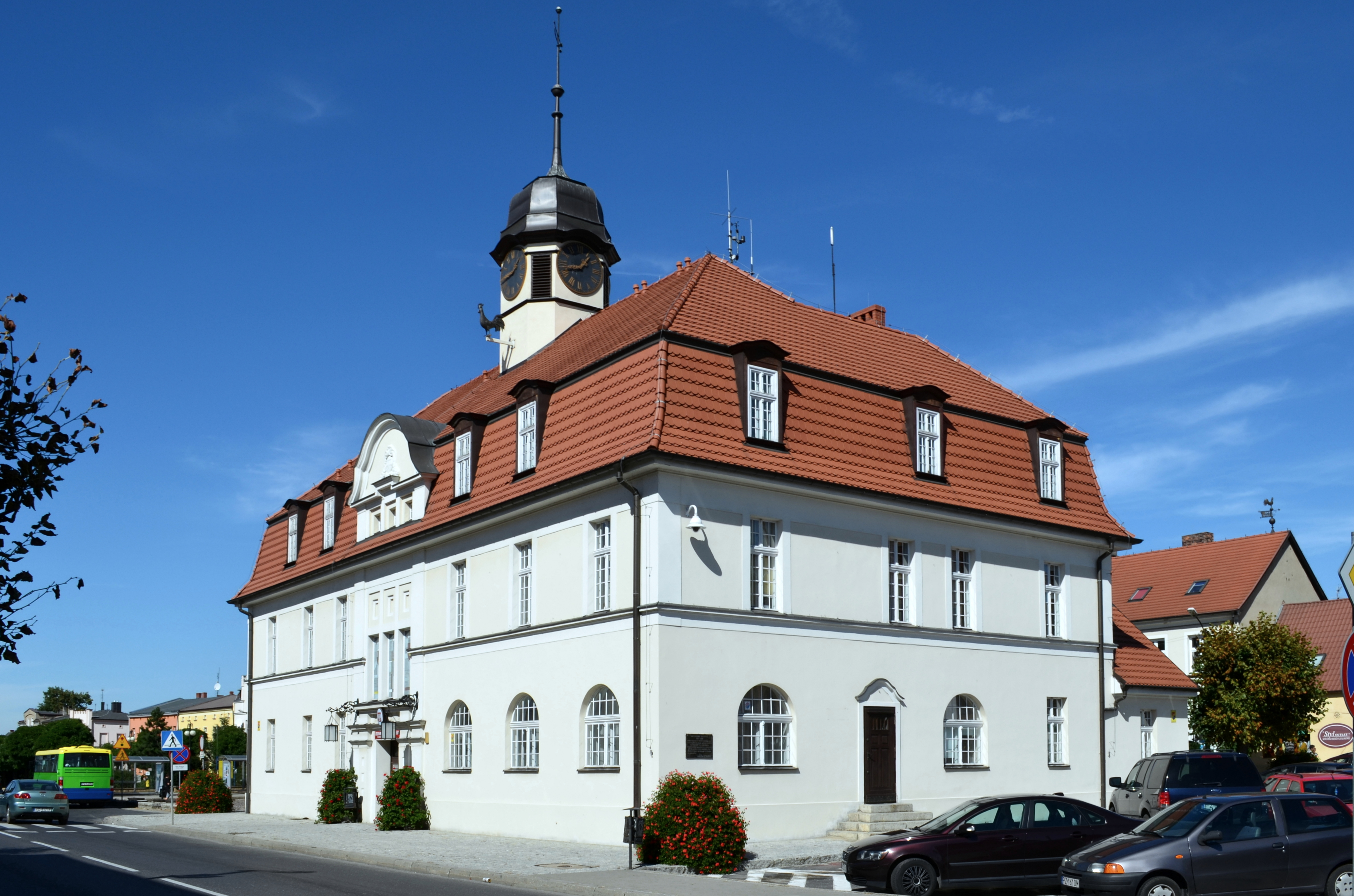 Kórnik, ratusz, poł. XIX, 1908-1909